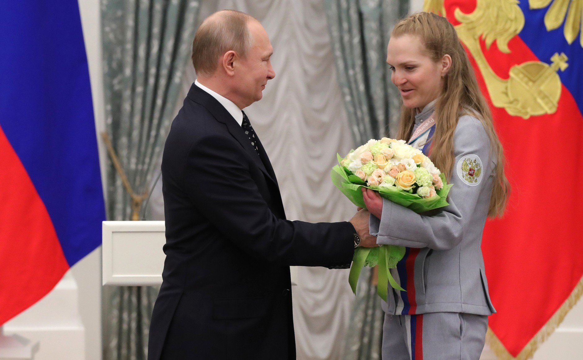 Президент России Владимир Путин с чемпионом Игр по лыжным гонкам и биатлону Екатериной Румянцевой